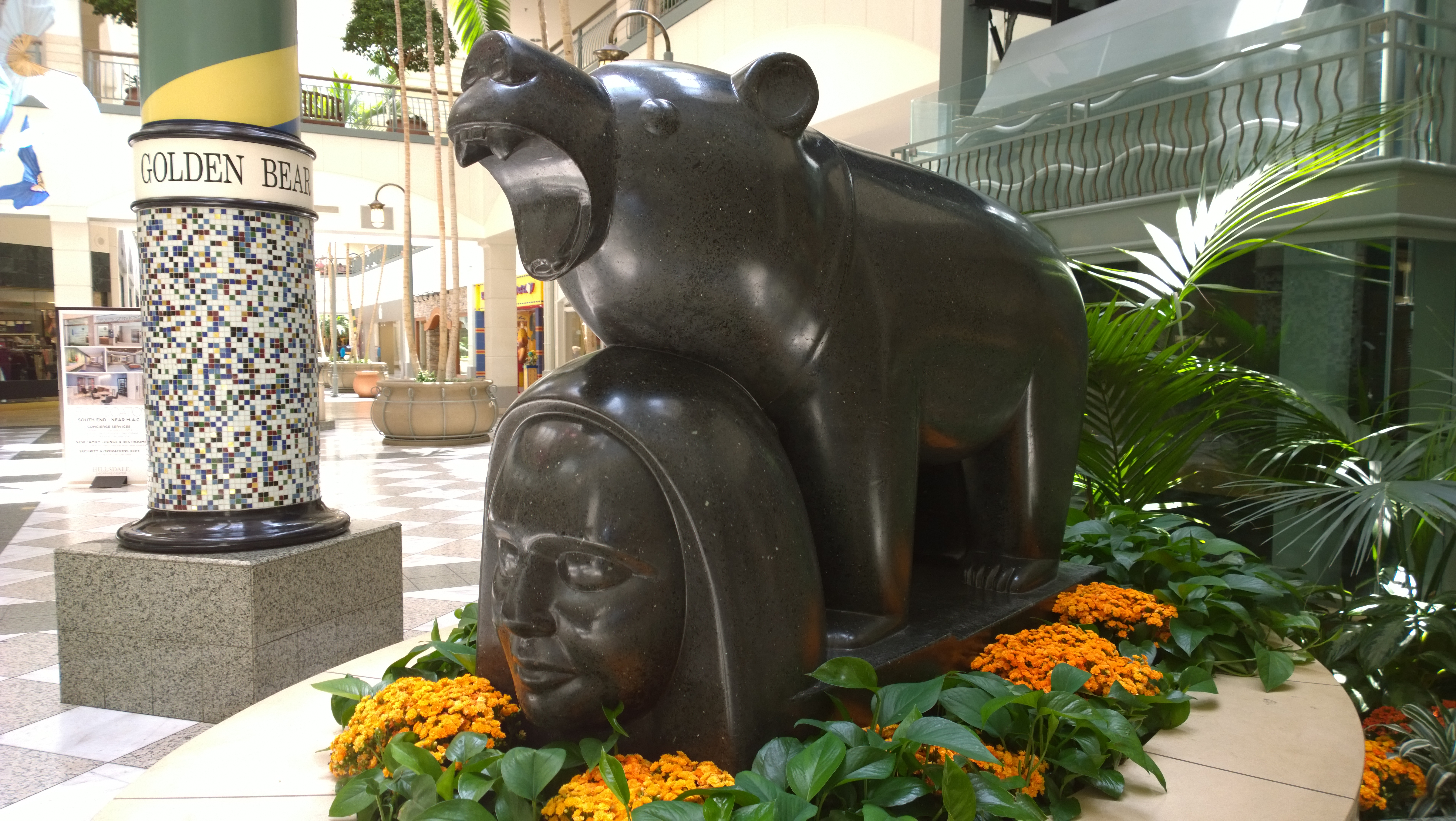 Beniamino Bufano sculpture "Golden Bear".